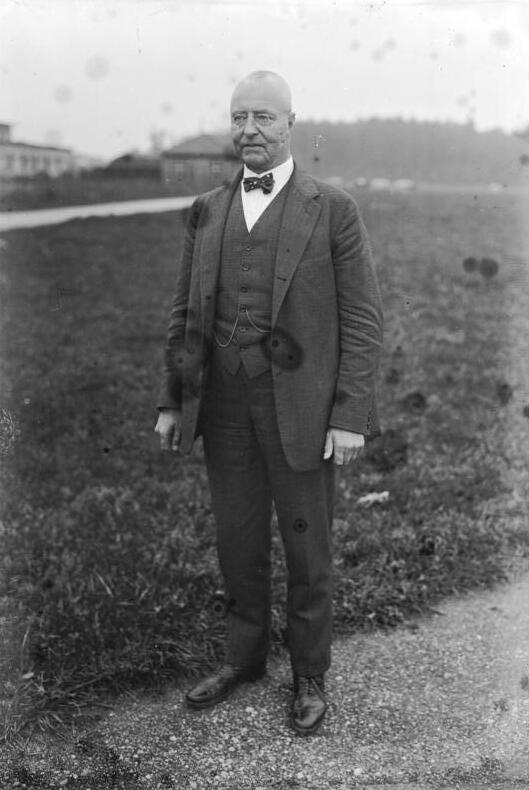 Generaldirektor Dr. Colsmann vom Luftschiffbau Zeppelin in Friedrichshafen tritt am 1. Juli nach über 20 jähriger Tätigkeit von seinem Posten zurück. Neueste Aufnahme des Generaldirektor Dr. Colsmann vom Luftschiffbau Zeppelin in Friedrichshafen.